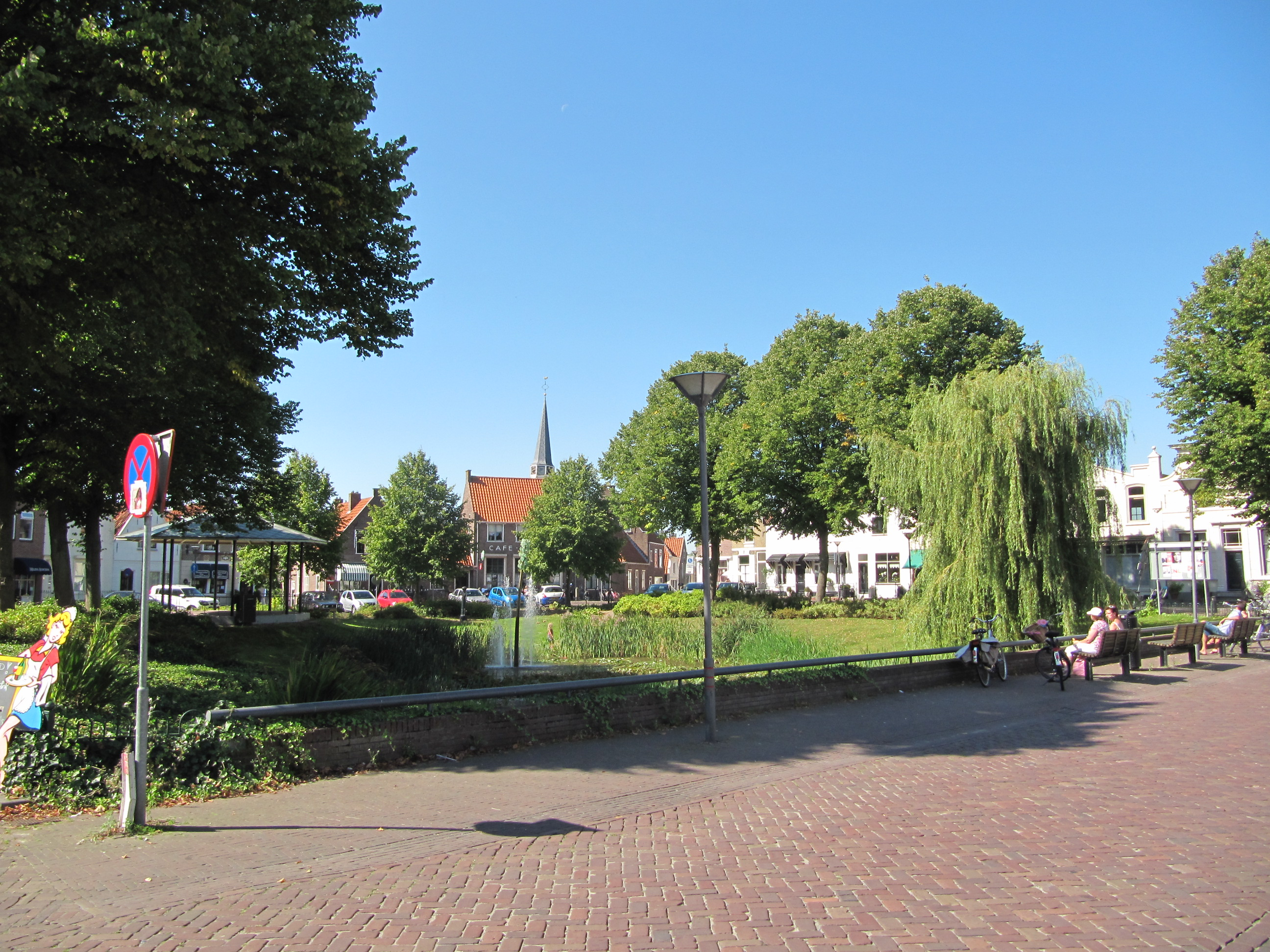 Zuidland